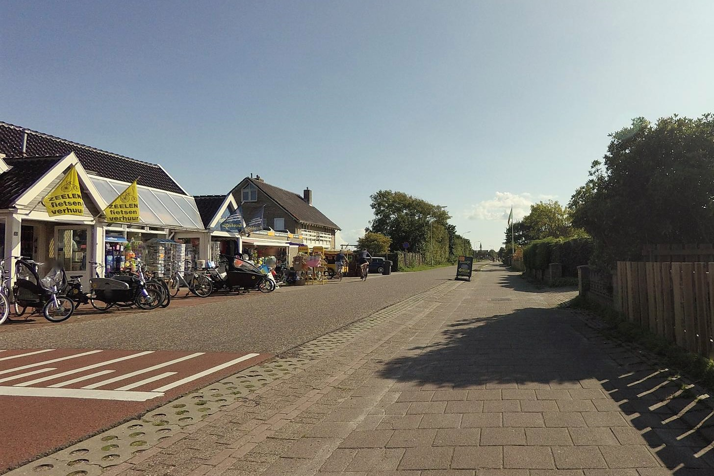 Midsland-Noord Heereweg Terschelling